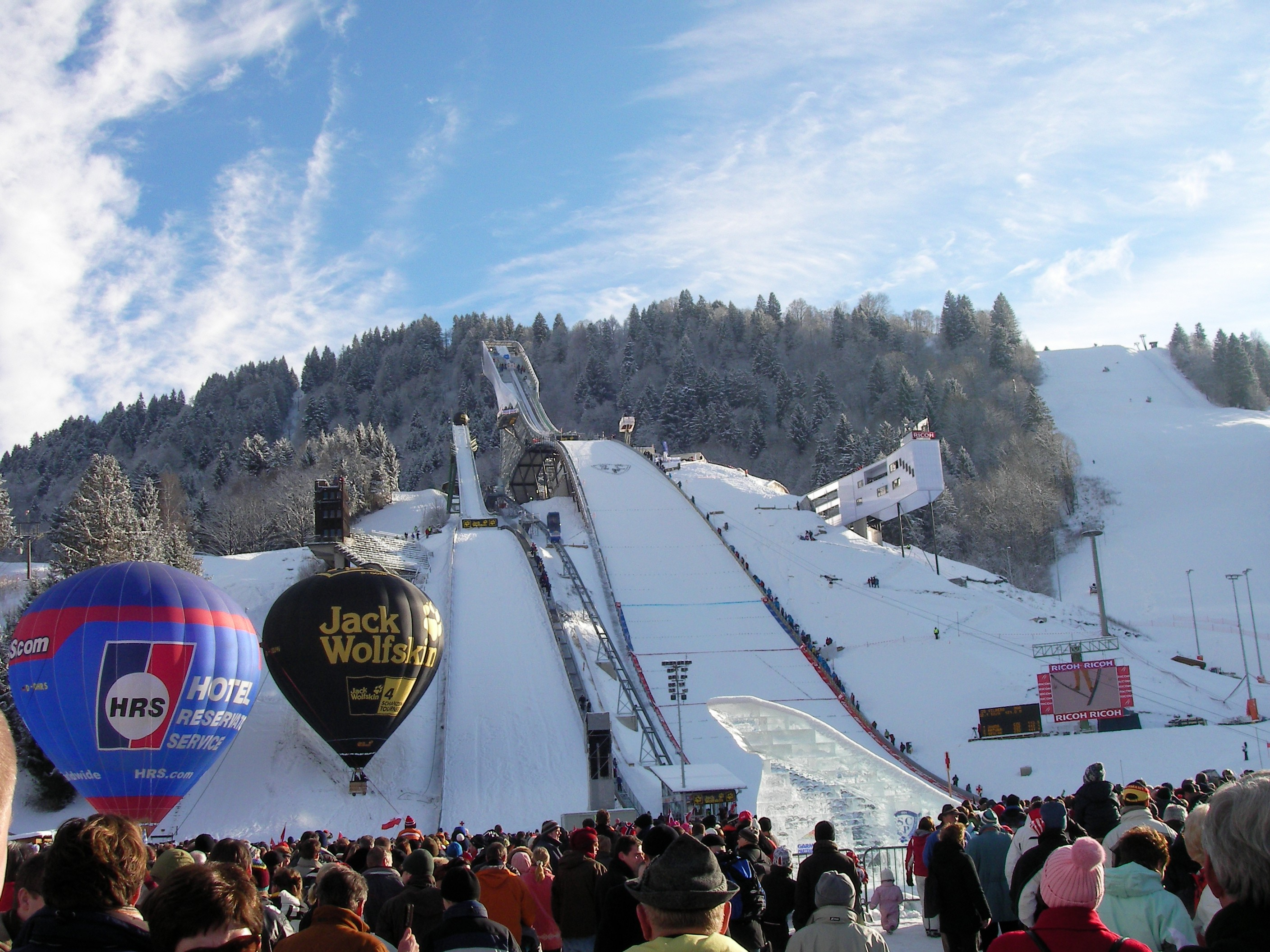 Neujahrsskispringen 2008